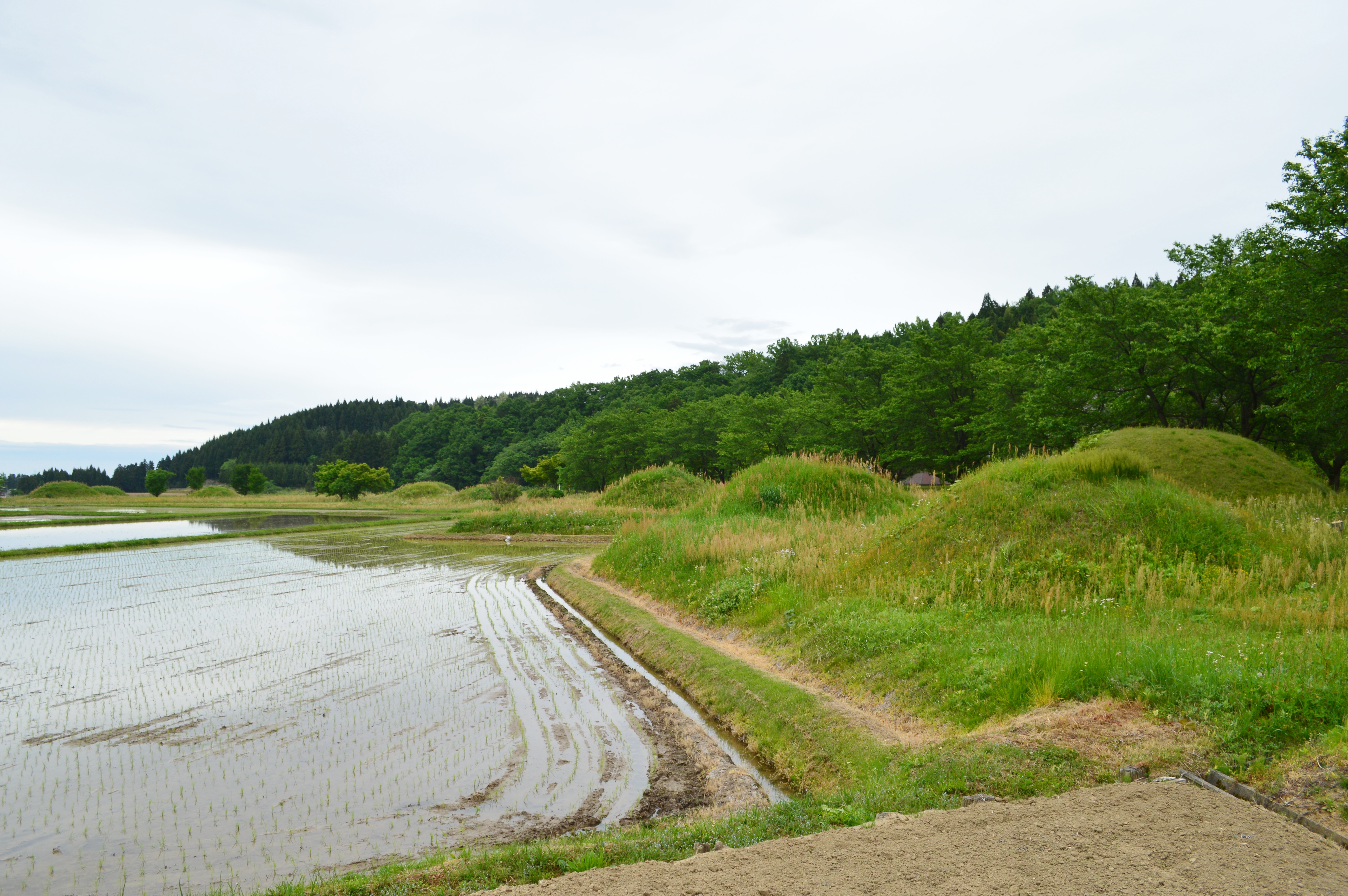 宮口古墳群 概観